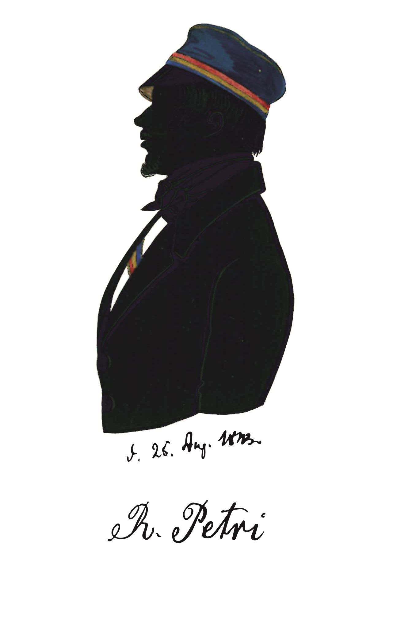 Schattenriss von Richard Petri